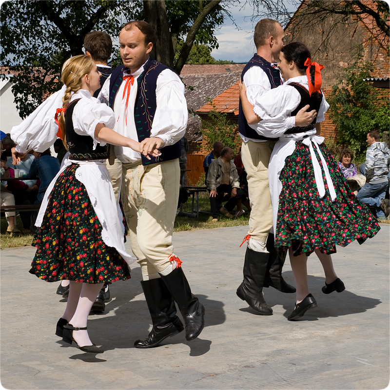 tanec